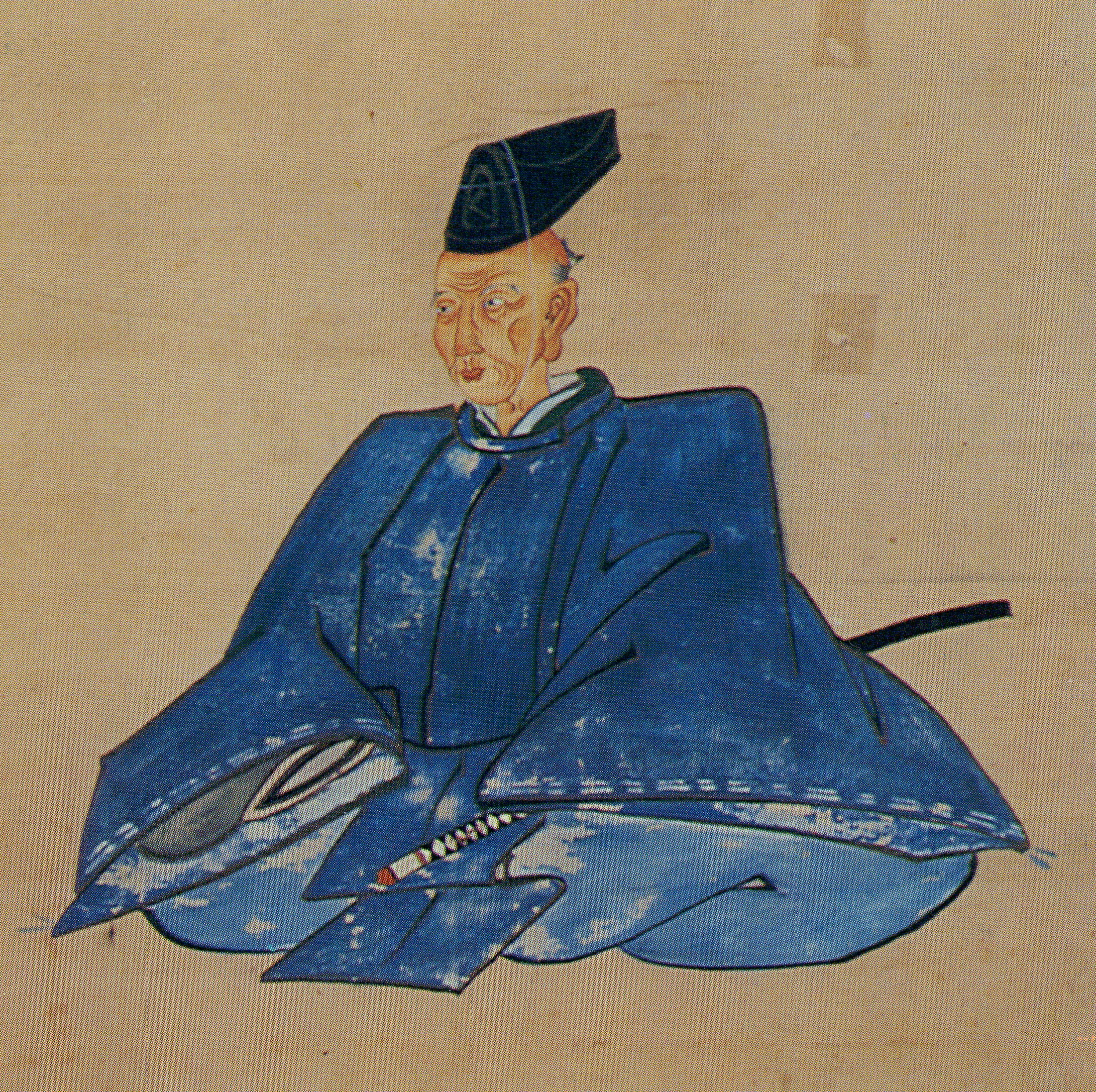 川崎平右衛門定孝の肖像。